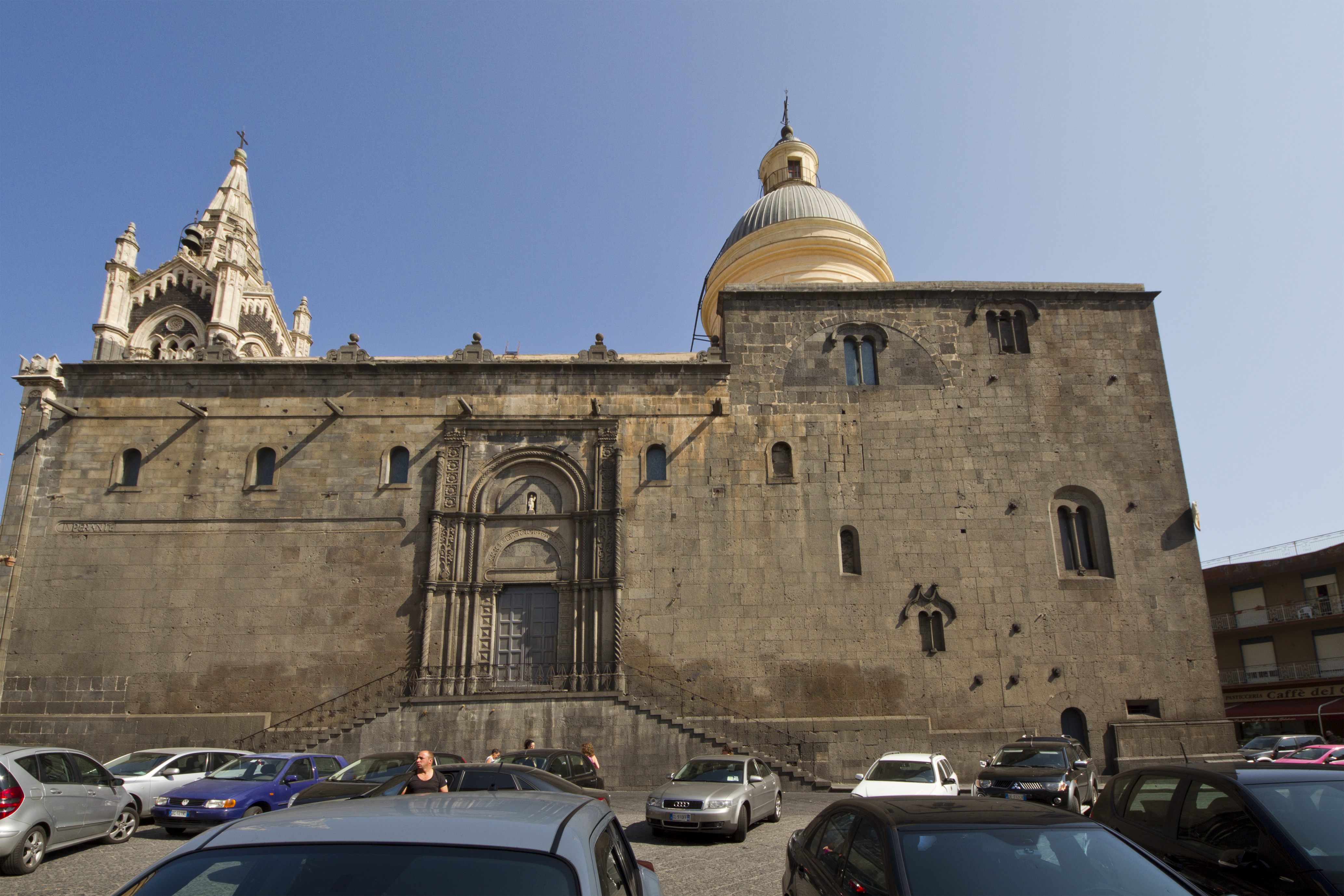 Basilica di Santa Maria, Randazzo Catania, Sicily, Italy